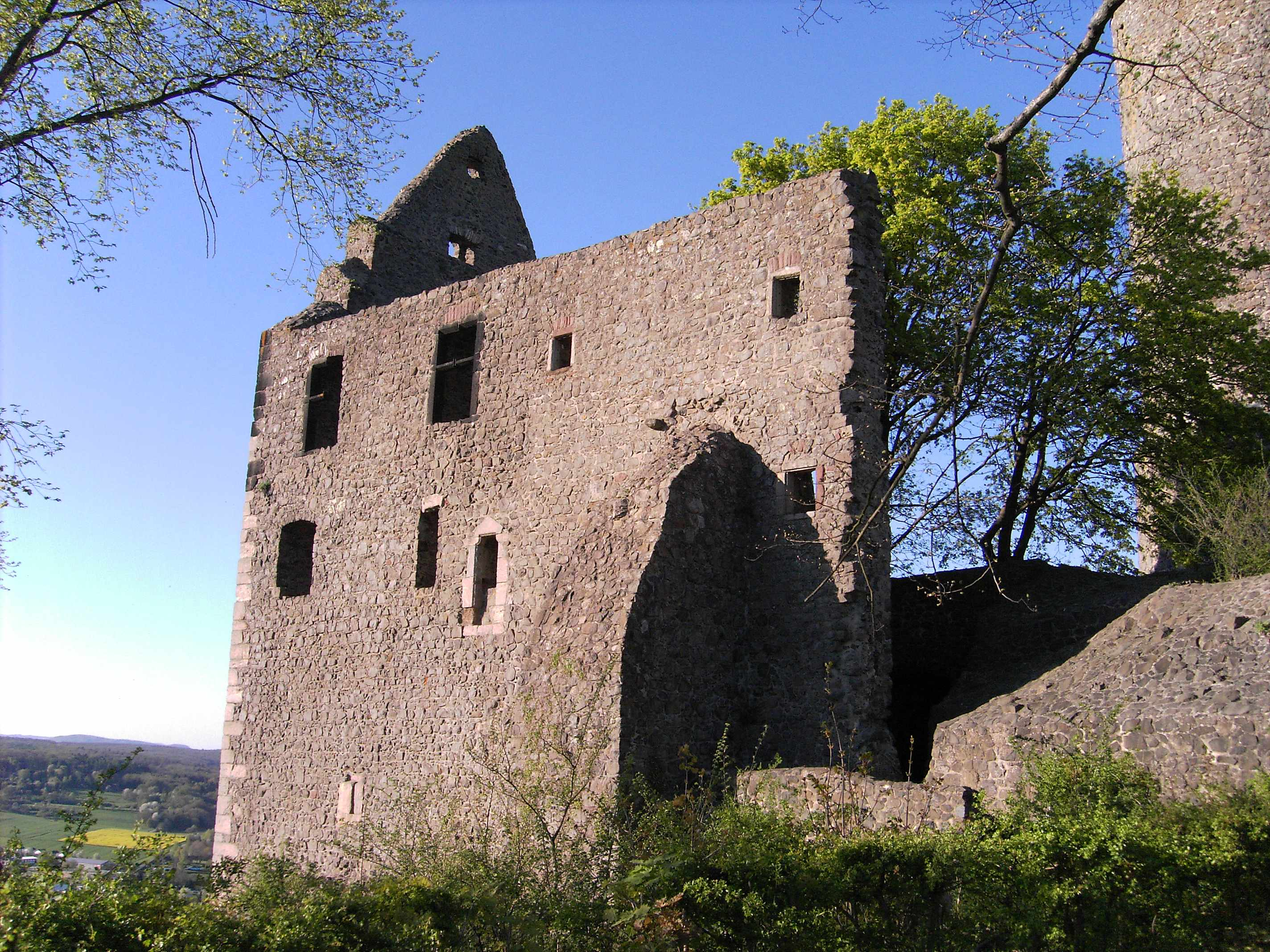 Burg Gleiberg in Krofdorf-Gleiberg bei Gießen